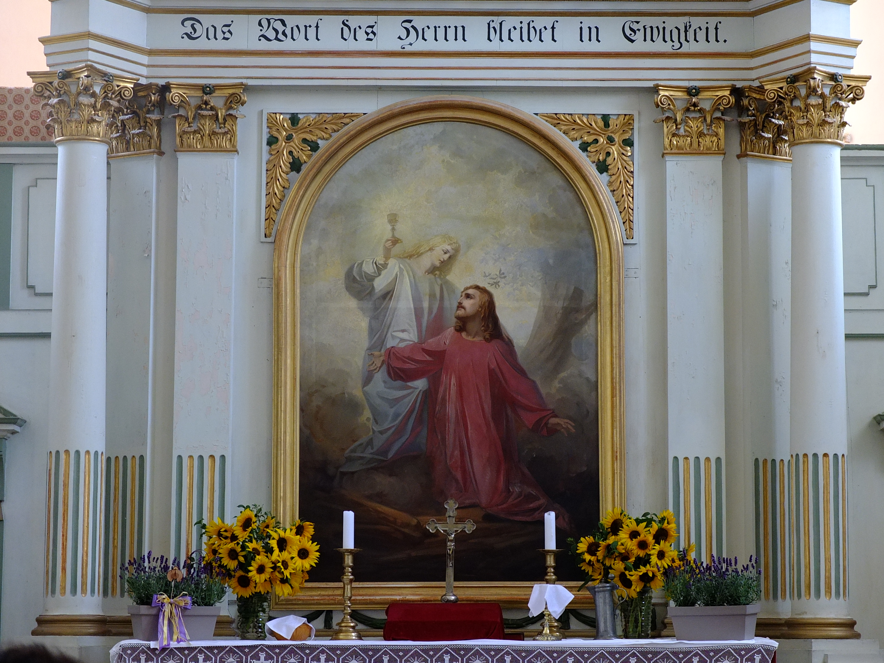 ”Isus pe Muntele Măslinilor” de Carl Dörschlag (1837-1917) 01